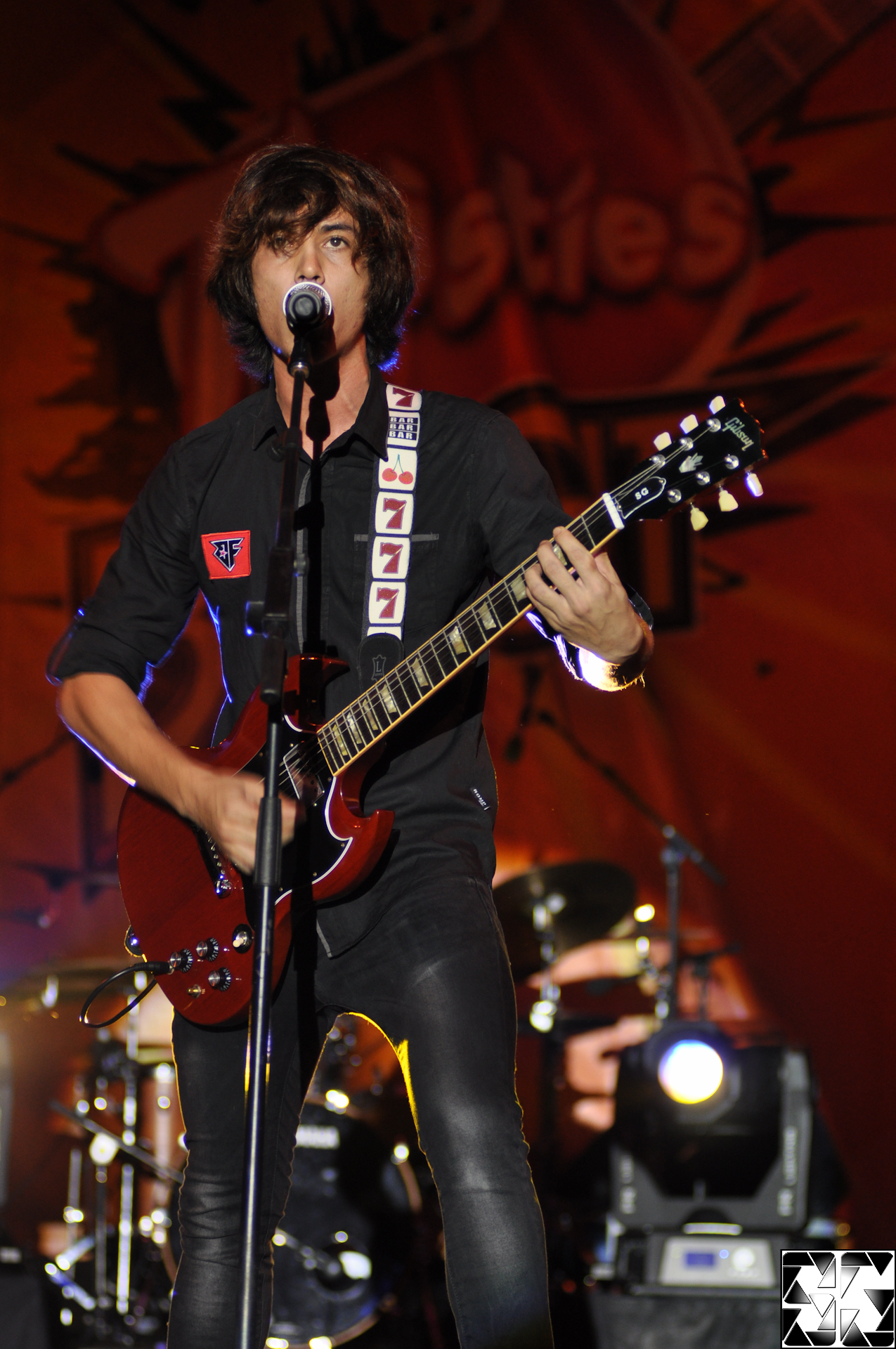 Sam Bunkface di Konsert Twisties Bingit 2010